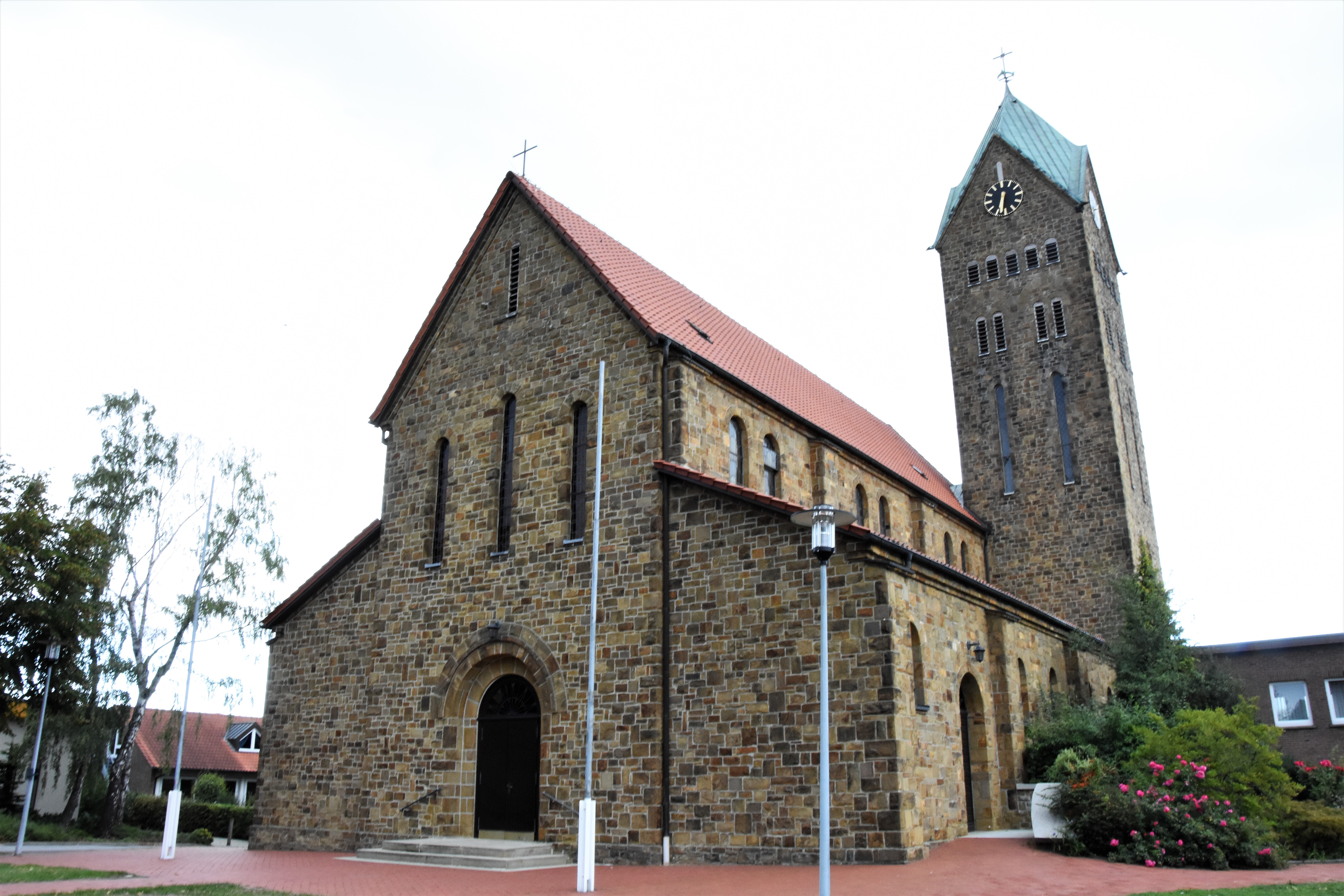 St. Martinus in Bramsche